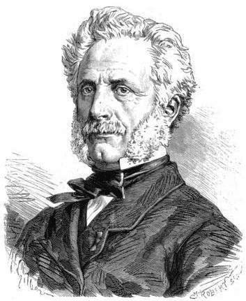 "M. Plichon, ministre des Travaux publics"